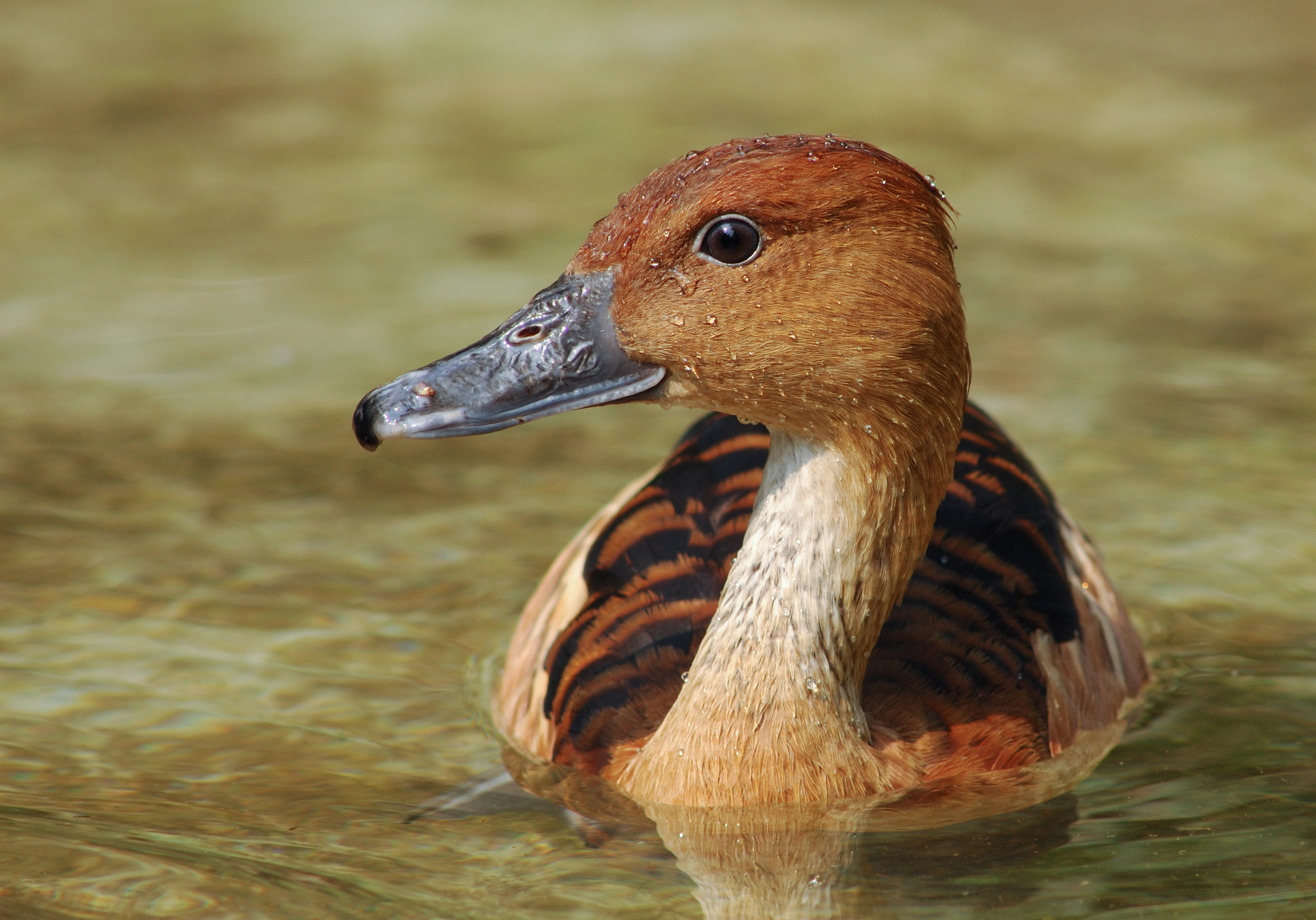 Eine 'Gelbe Pfeifgans' oder Dendrocygna bicolor, aufgenommen in der Wilhelma, Stuttgart